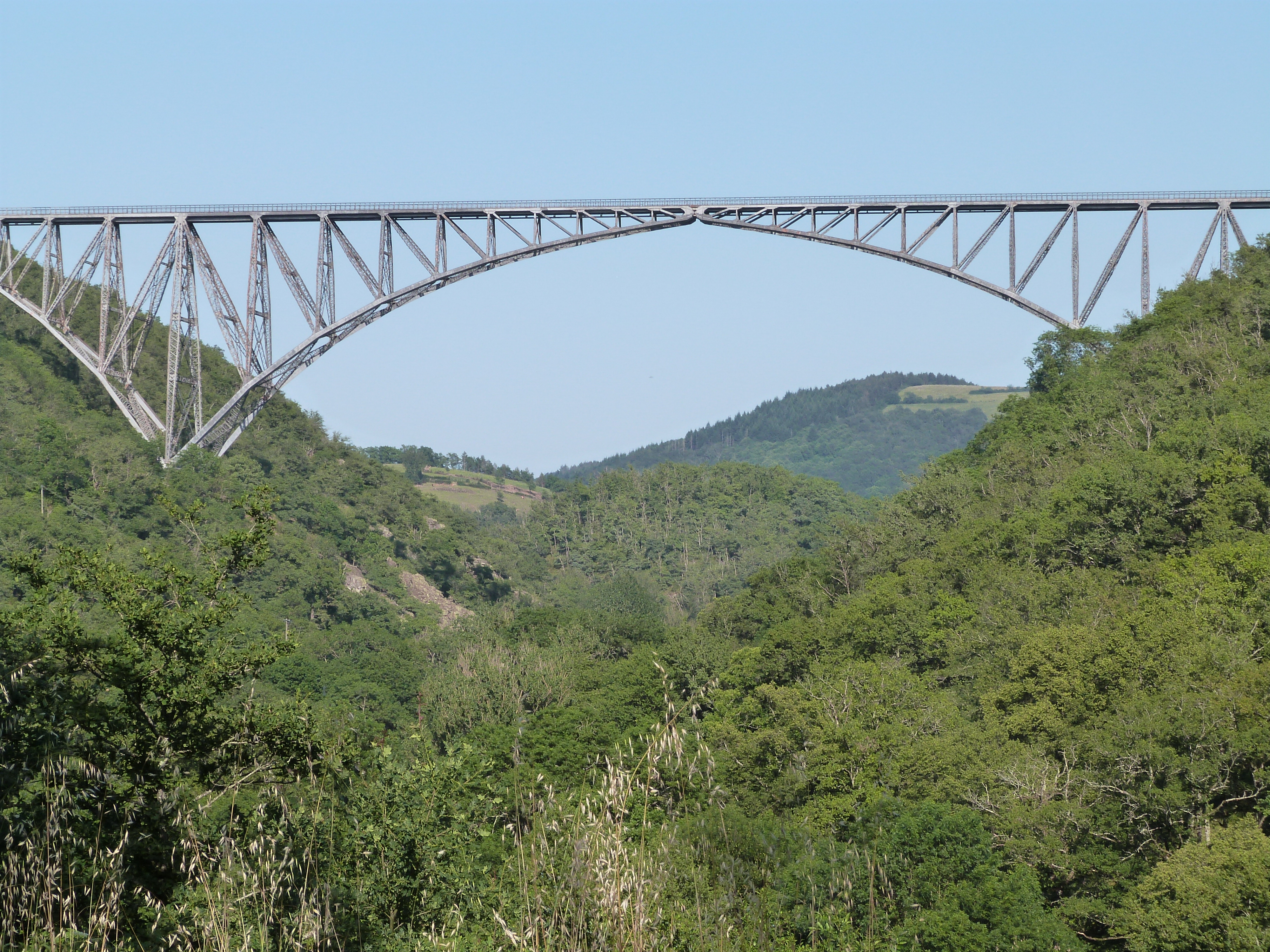 Viaduc du Viaur, (Inscrit, 1984) Le viaduc qui enjambe le Viaur sur une longueur de 460 m repose sur un arc central de 200 m d'envergure .